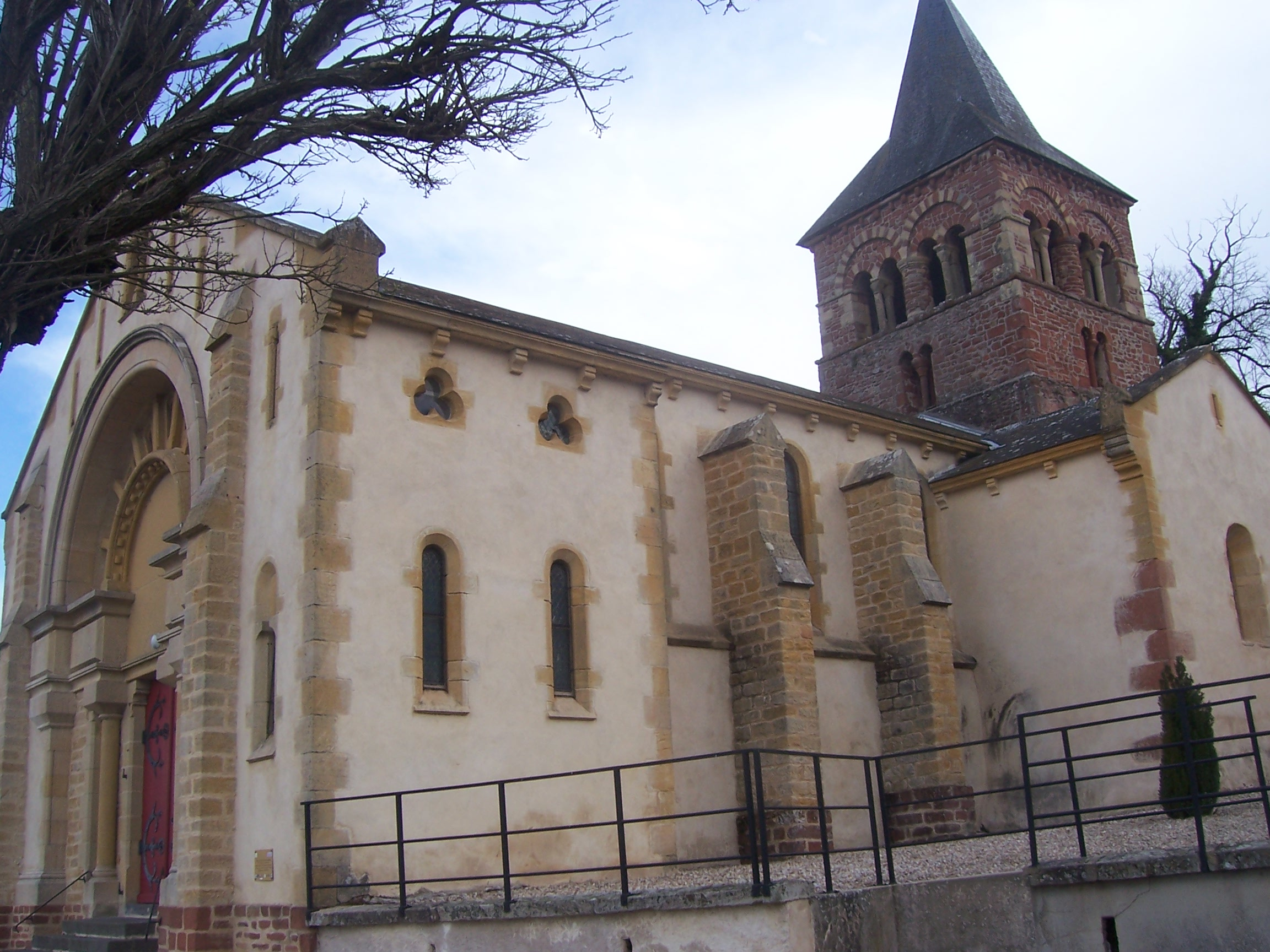 Eglise de Saint-Agnan